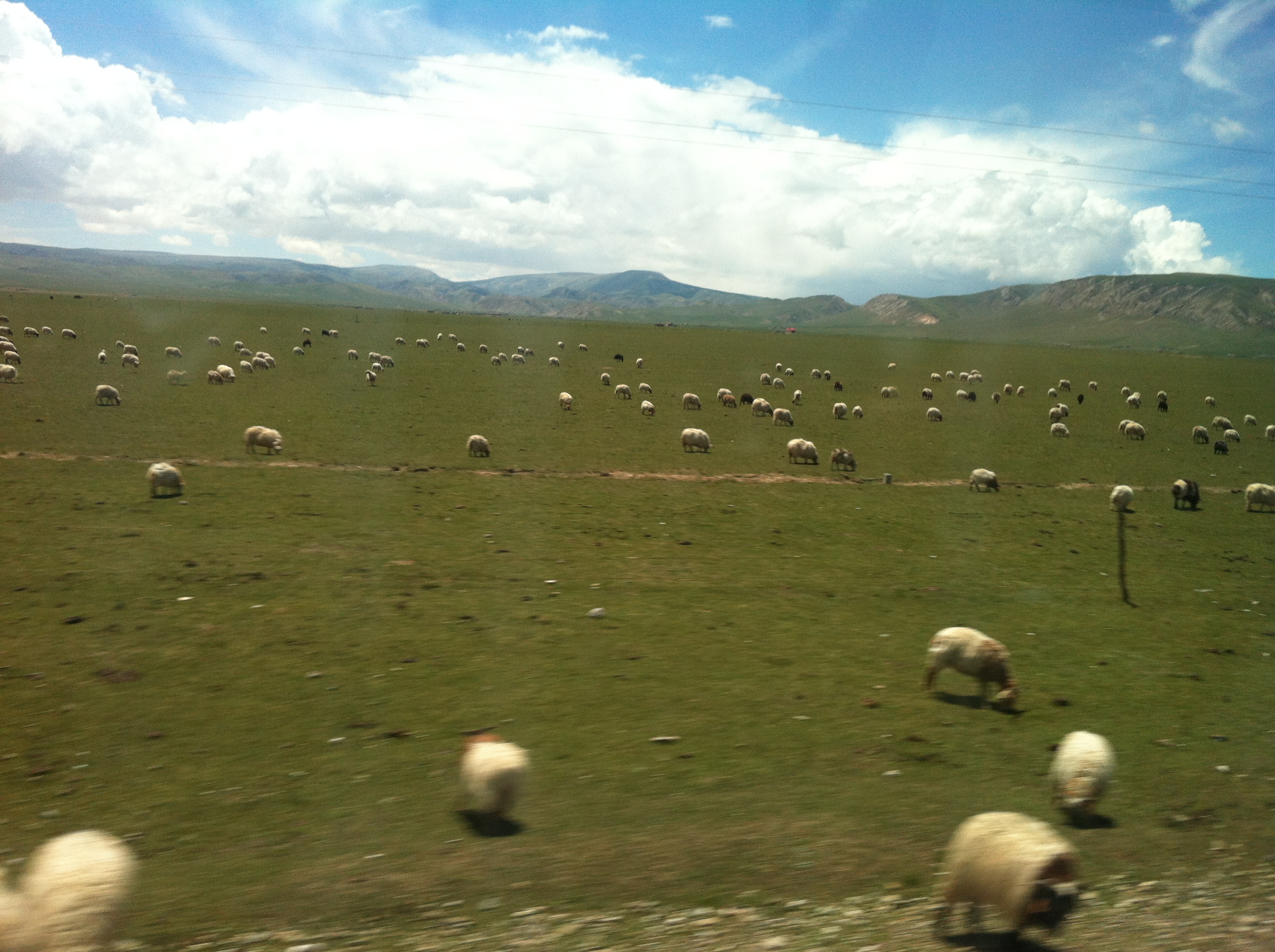 湖邊羊群